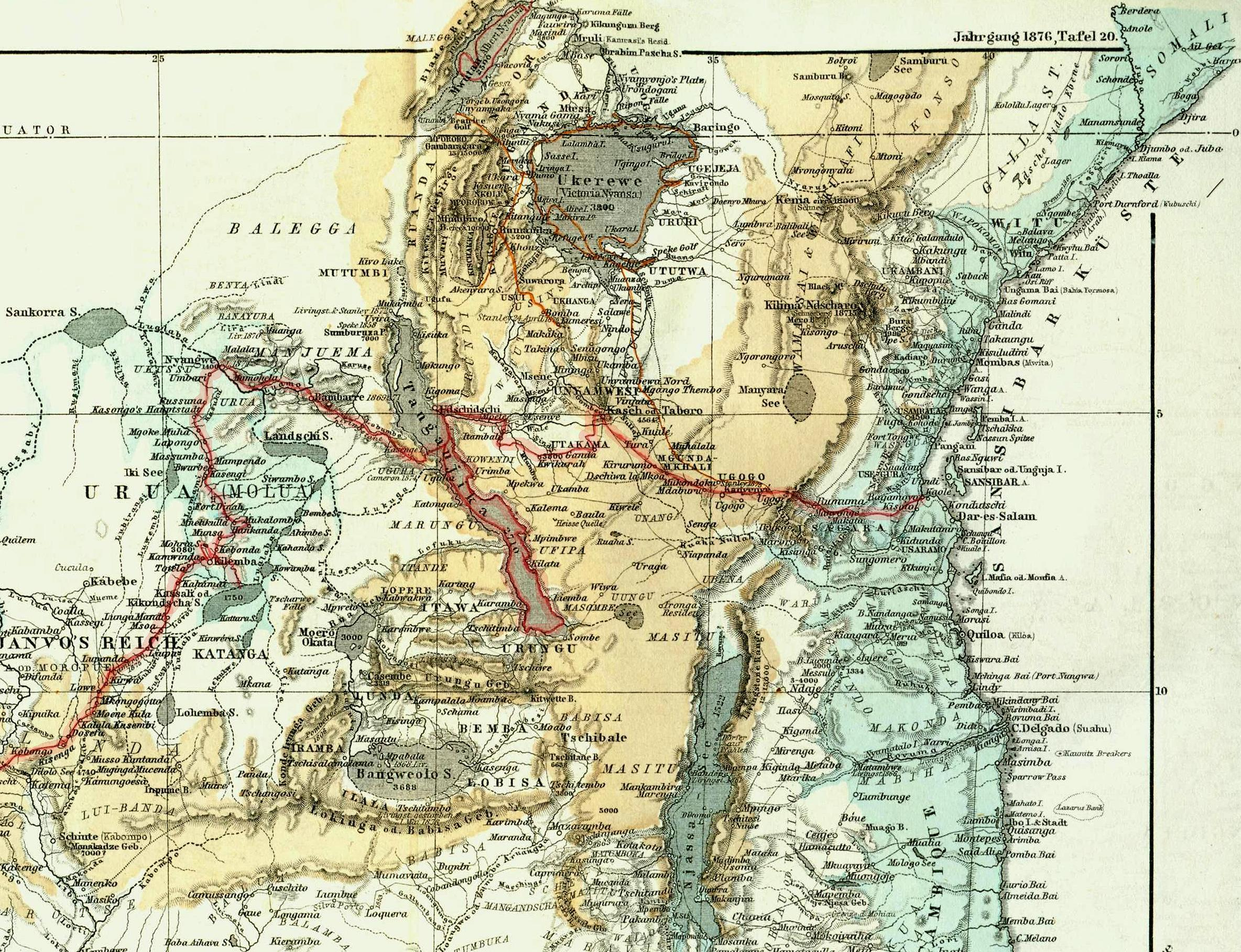 Cameron's Reise von Bagamoyo zum Tanganjika-See